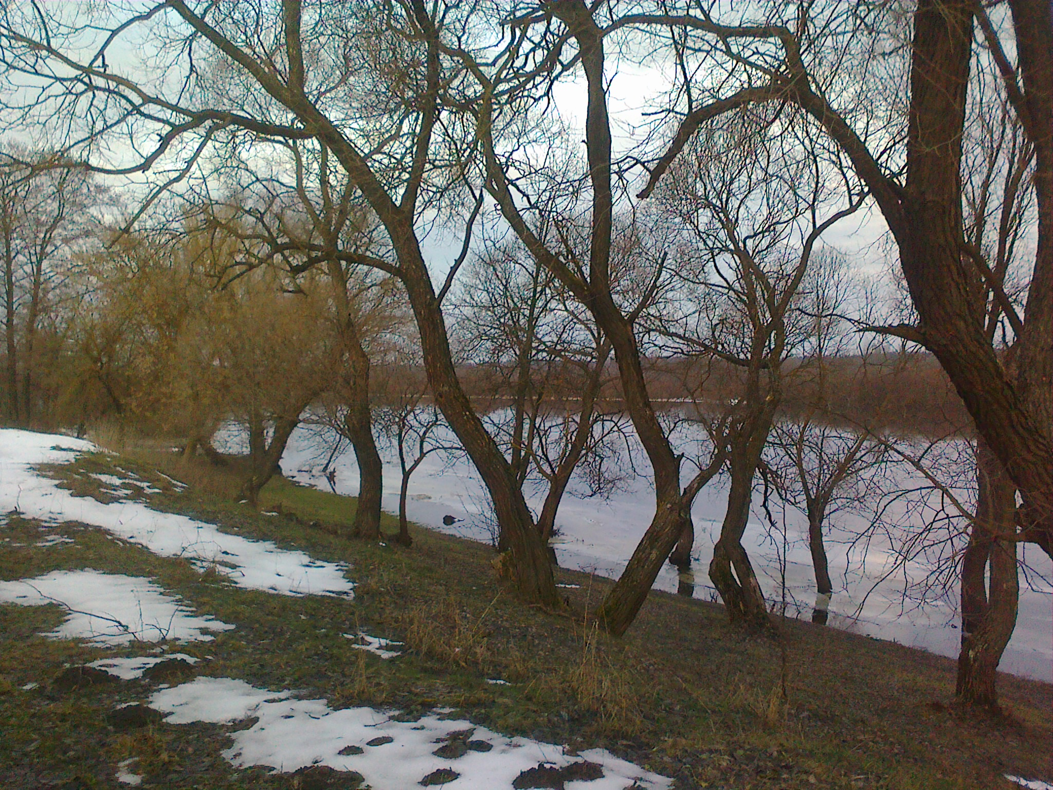 деревня Стасевка, вид на реку Березина